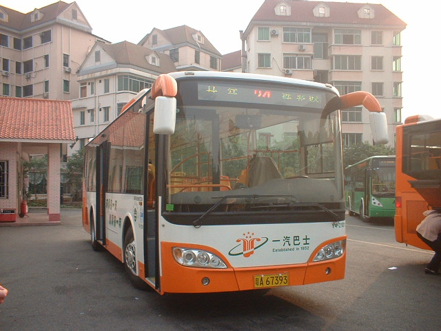 廣州一汽巴士。